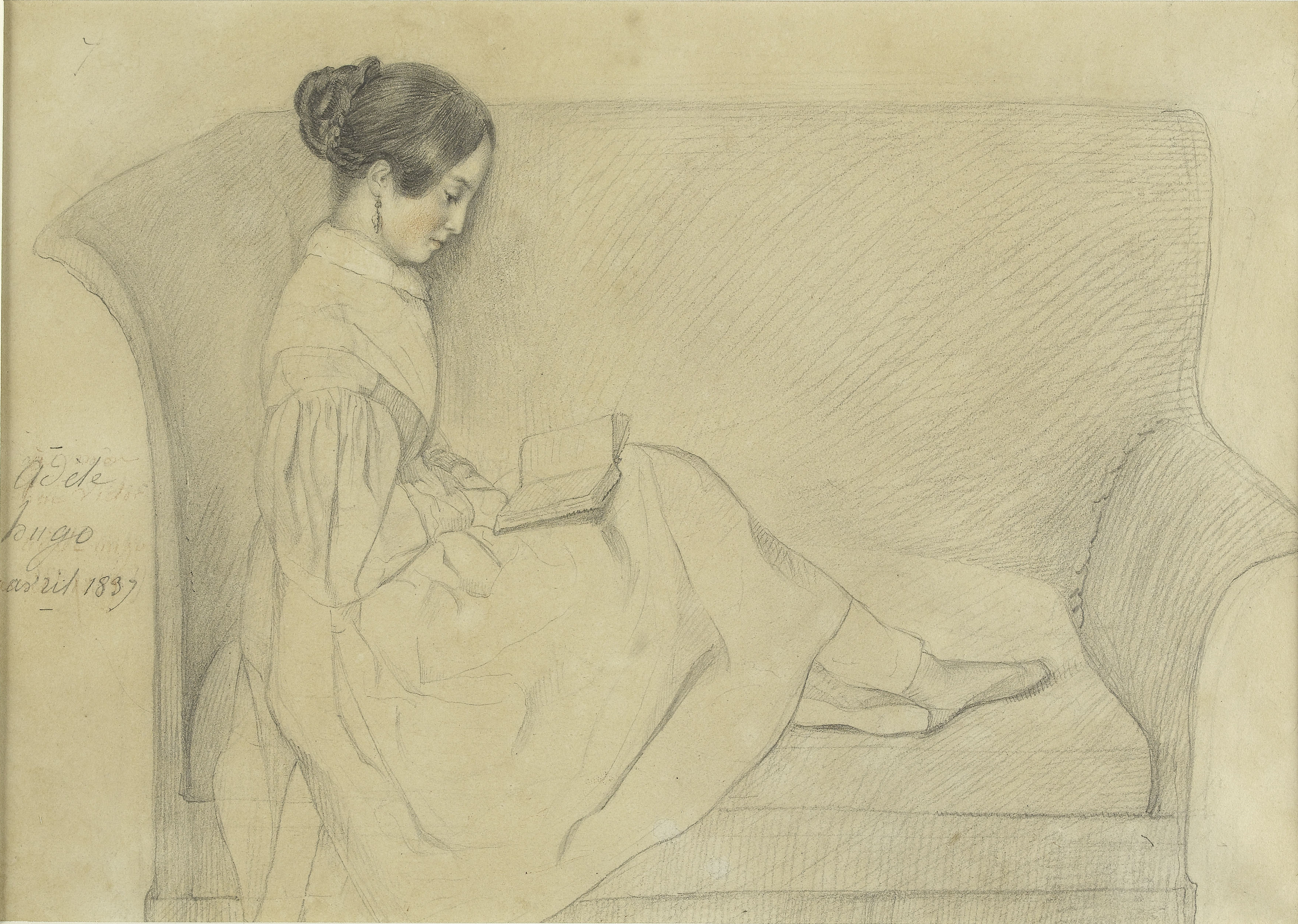 Portrait de Léopoldine Hugo par sa mère, monté avec un fragment de robe et deux inscription manuscrites de Victor Hugo Inscription - Au milieu, à gauche "à mon cher Victor Adèle Hugo avril 1837" . Inscription - Au dessous du dessin, à gauche "Robe de Didine - 1834. V. H" . Inscription - Au dessous du dessin, à droite: "Oh! La belle petite robe/ Qu'elle avait, vous rappelez vous?"